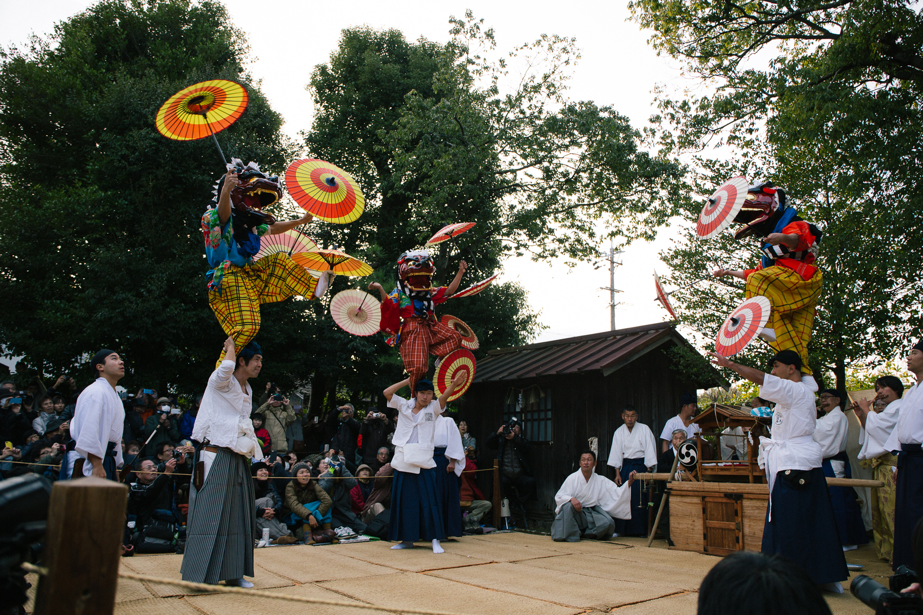 伊勢大神楽の本拠である増田神社での総舞